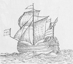 Шмак «Онега», спущен в 1704 году.